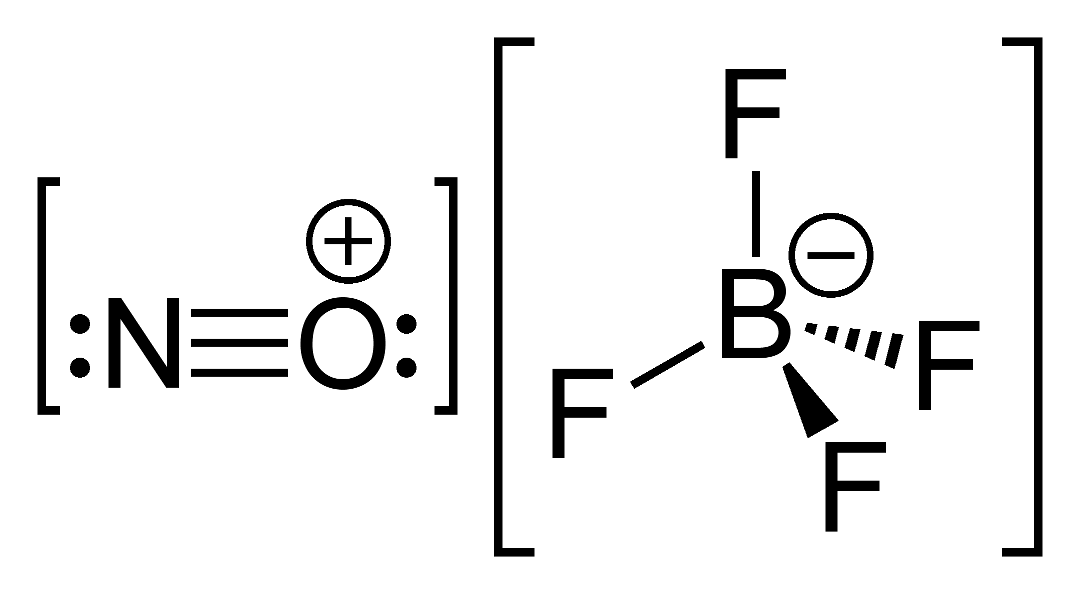 Structural formula of nitrosonium tetrafluoroborate, [NO][BF4]. Structure drawn in ChemBioDraw Ultra 12.0.